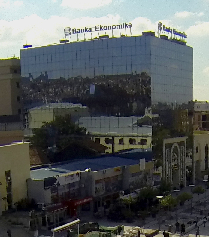 Banka Ekonomike at Bulevardi Nënë Tereza, Pristina; photographed from the Sheshi Skënderbeu